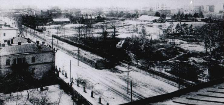 Площадь после разрушения собора Христа Спасителя, Самара